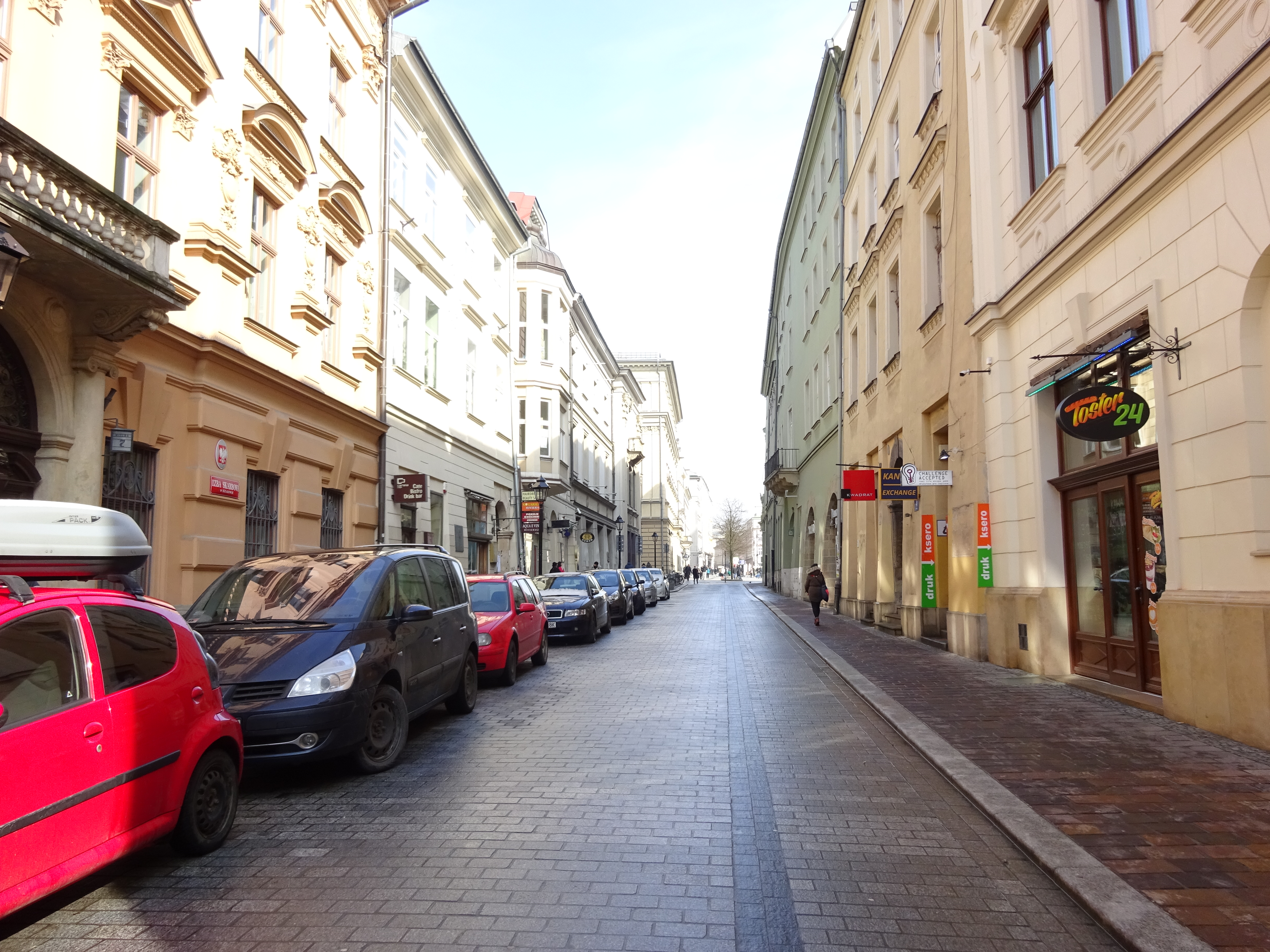 Ulica Wiślna w Krakowie. Widok w stronę Rynku Głównego. Po remoncie, 2016.